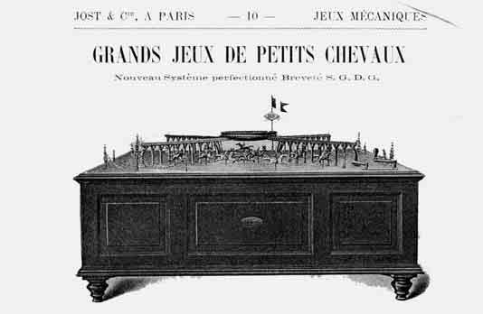 Petits Chevaux Tisch